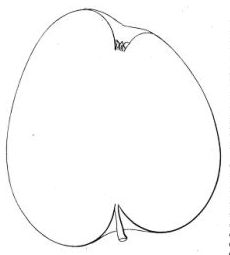 Belle-Fille Normande, André Leroy, 1875, Dictionnaire de pomologie.